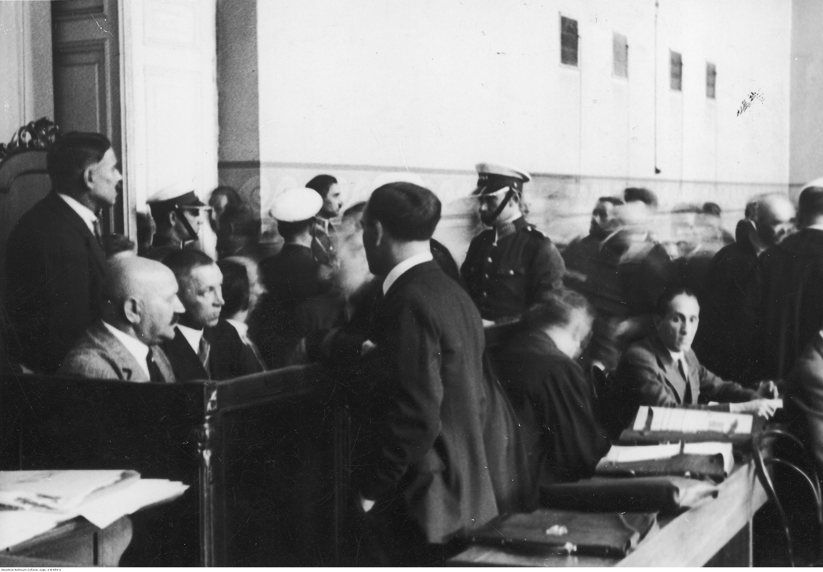 Proces przeciwko członkom gangu z warszawskiego targowiska Kercelak, którzy pod wodzą Łukasza Siemiątkowskiego ("Tata-Tasiemka") wymuszali haracz od kupców, przed sądem w Warszawie